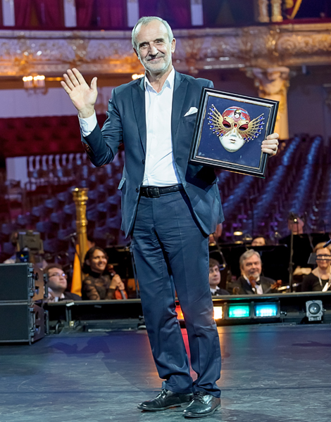 Римас Туминас - лучшая работа режиссера в драме Фотограф Дмитрий Дубинский